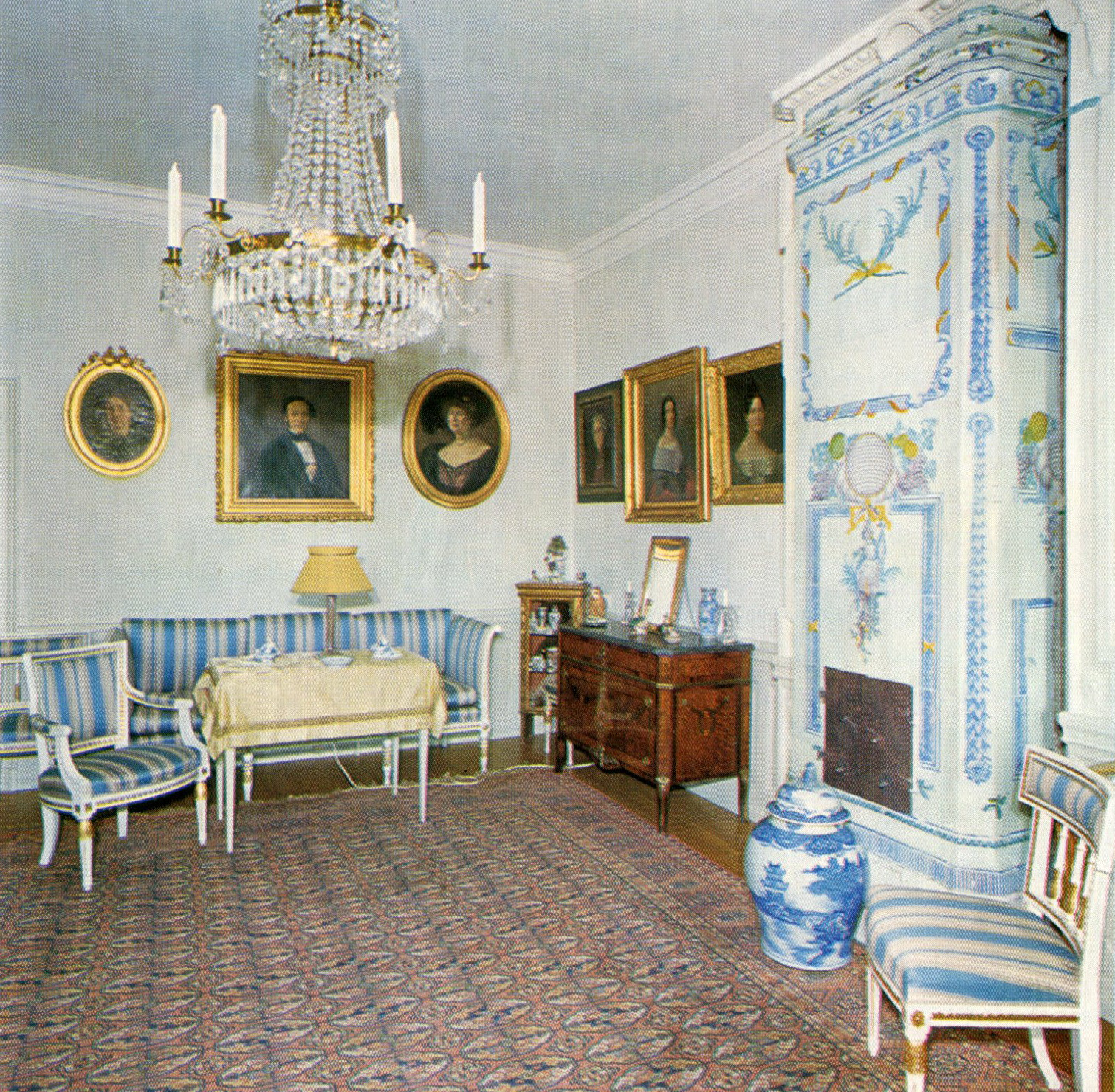 Brunnsholms herrgård, salongen